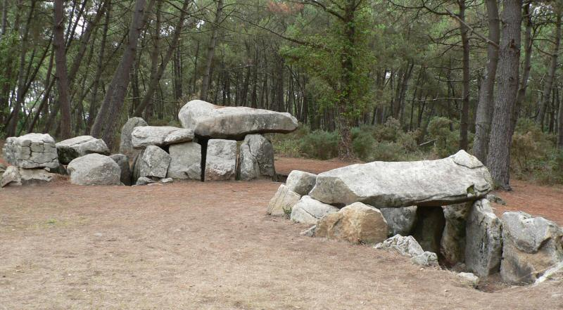 Les dolmens de Mane-Kerioned